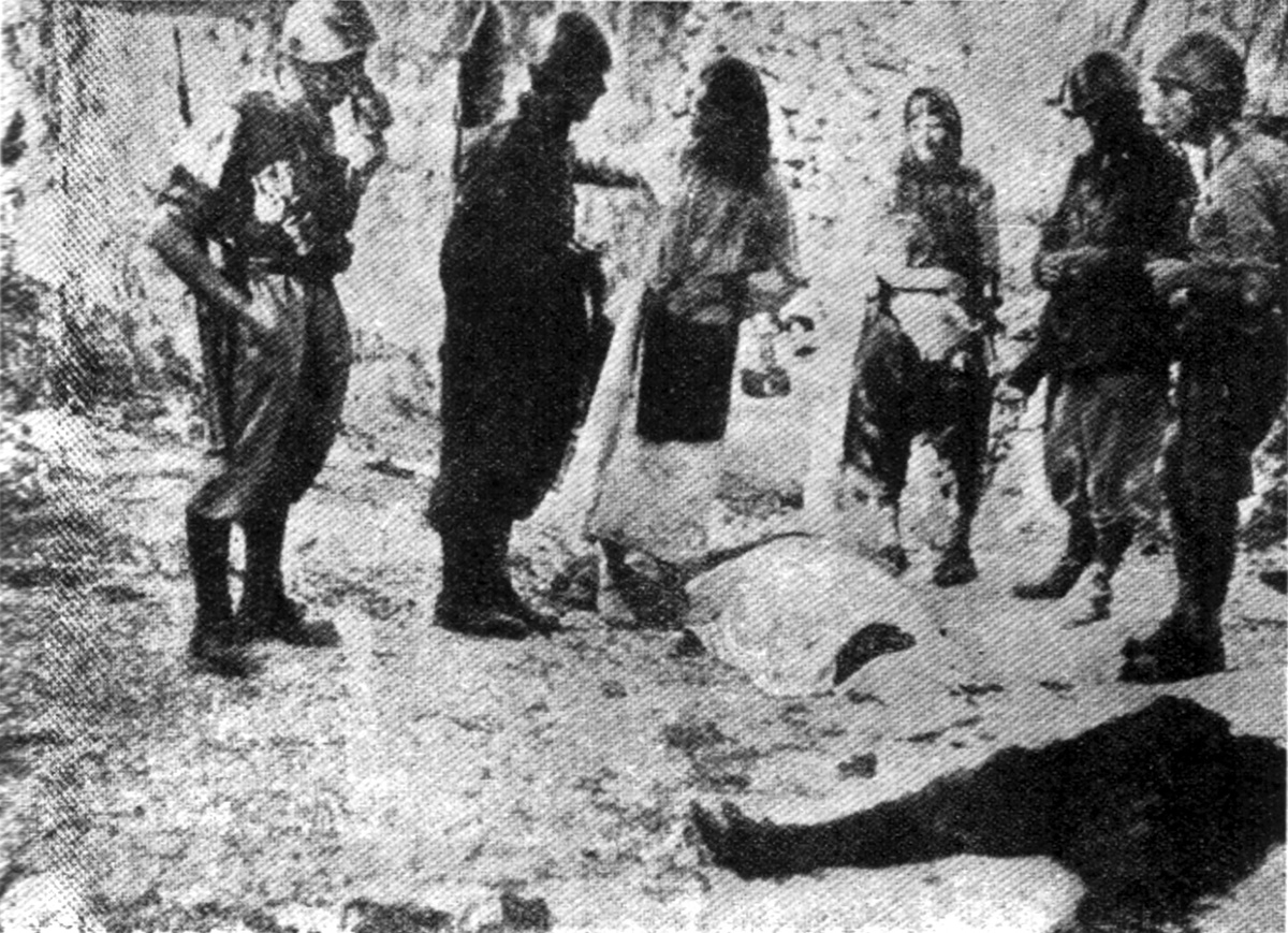 Srpskohrvatski / српскохрватски: Jedan od mnogih zločina italijanskih fašista nad narodom u Crnoj Gori.